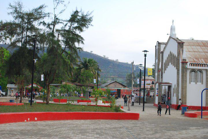 Une Partie de la place publique de lascahobas à l'entré du centre-ville.